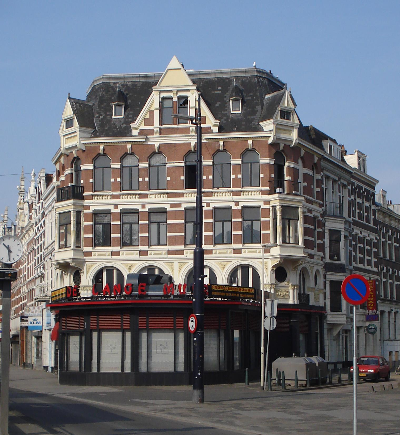 Rotterdam, Westkruiskade 1. Gemeentelijk monument.